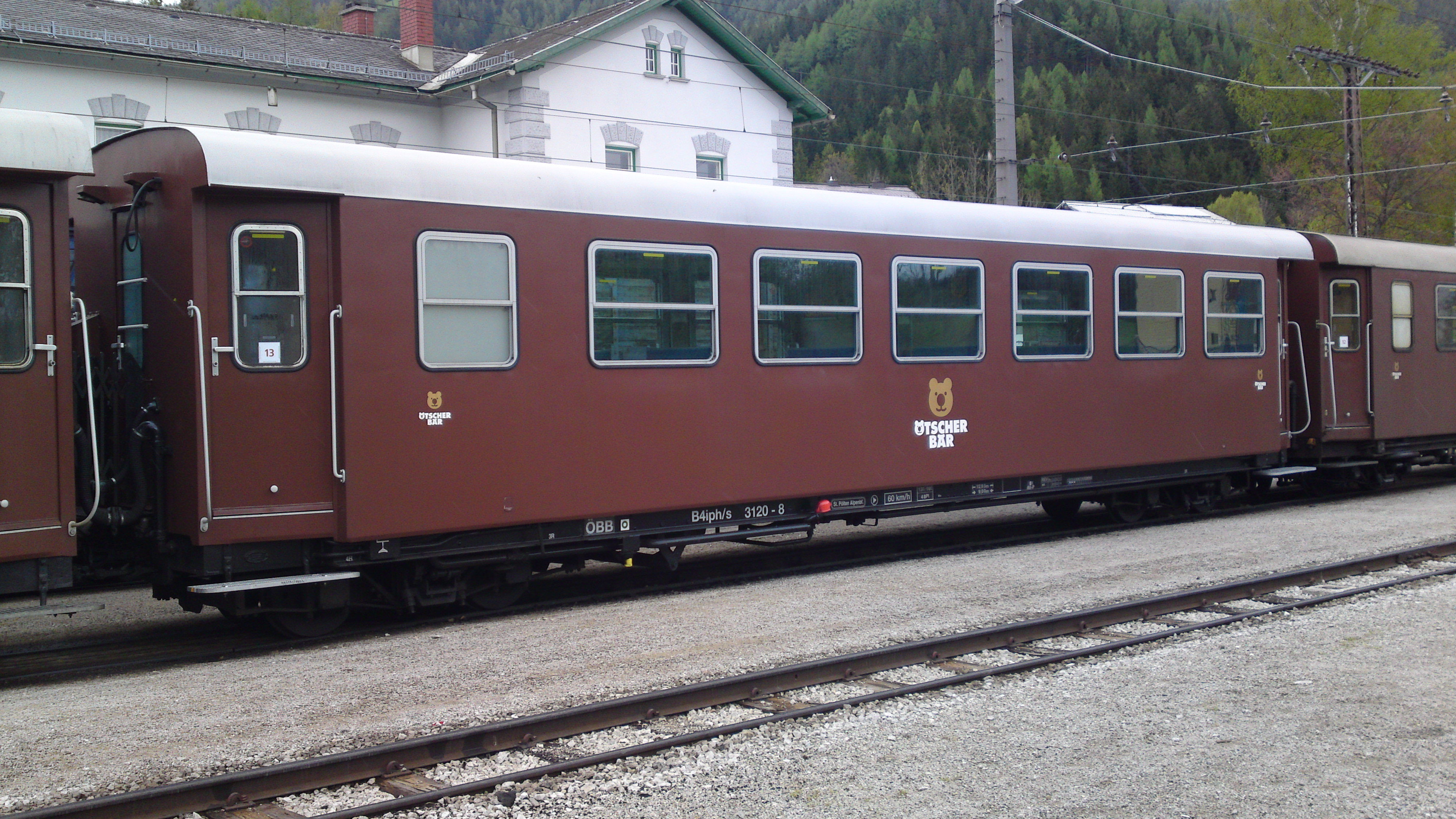 BD4iph/s 3120-8